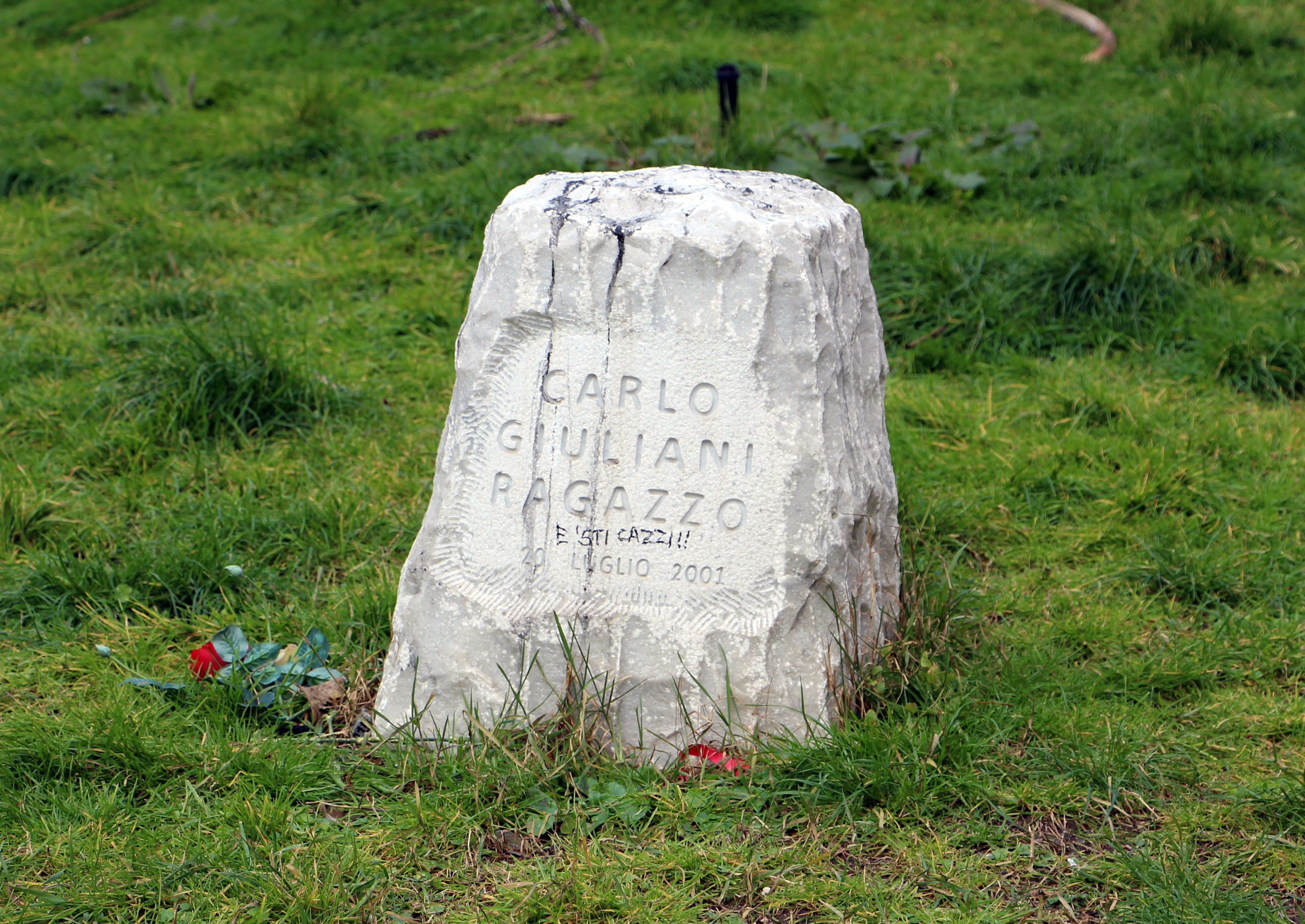 Il cippo dedicato a Carlo Giuliani in Piazza Gaetano Alimonda, a Genova, vandalizzato da una scritta